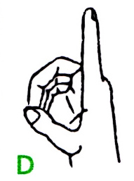 Buchstabe D im deutschen Fingeralphabet, gemäß einer Infokarte der Deutschen Gehörlosenhilfe Bayern e.V